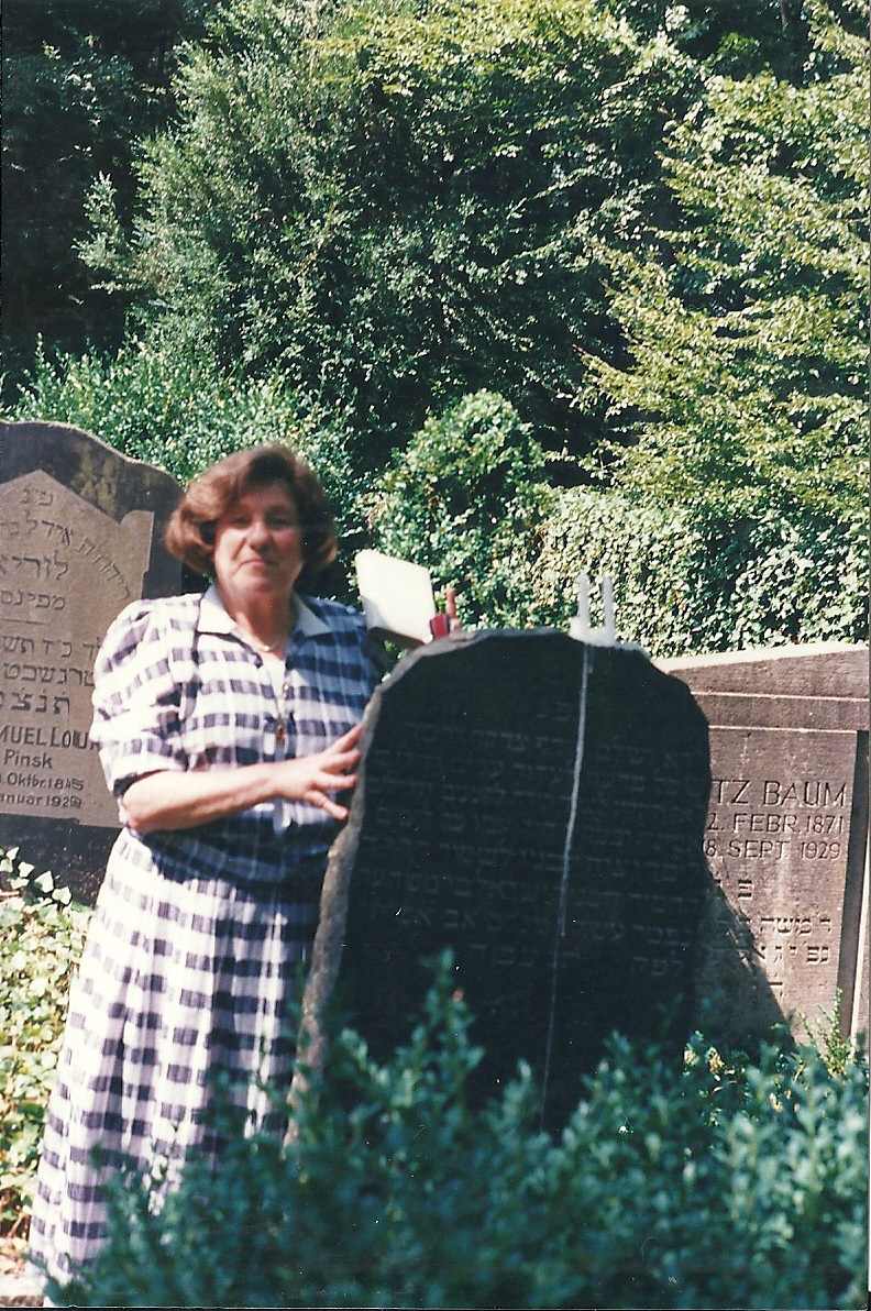 מצבת הרה"ח ישראל דורנר